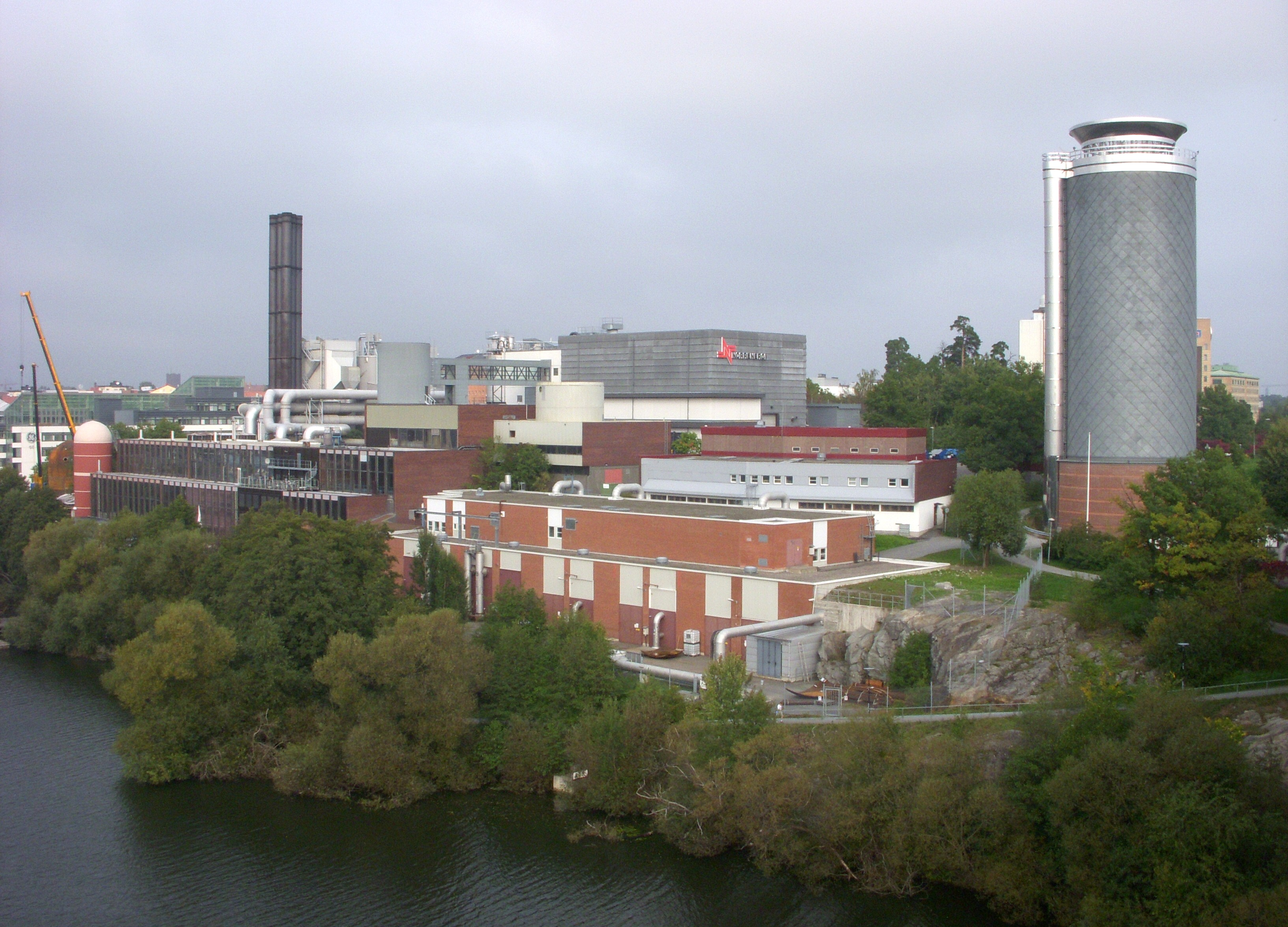 Värmepumpverket Norrenergi i Solna